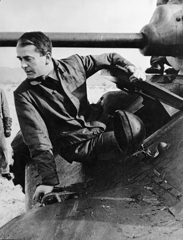 Albert Speer, Panzer T-34 Der Reichsminister für Bewaffnung und Munition [Albert] Speer bei der Besichtigung eines sowjetischen Panzers vom Muster T 34. Achtung PK-Aufnahme! Bei Abdruck nennen: OT Kriegsberichter Kobierowski (Sch) 25.6.1943 Zur Beachtung! Dieses Bild darf erst ab 28. Juni 1943 und nur in Verbindung mit den Textveröffentlichungen über Feindpanzer gebracht werden. Abgebildete Personen: Speer, Albert Prof. Dr.: Reichsminister für Rüstung und Kriegsproduktion, Architekt, Deutschland (PND 118615998)